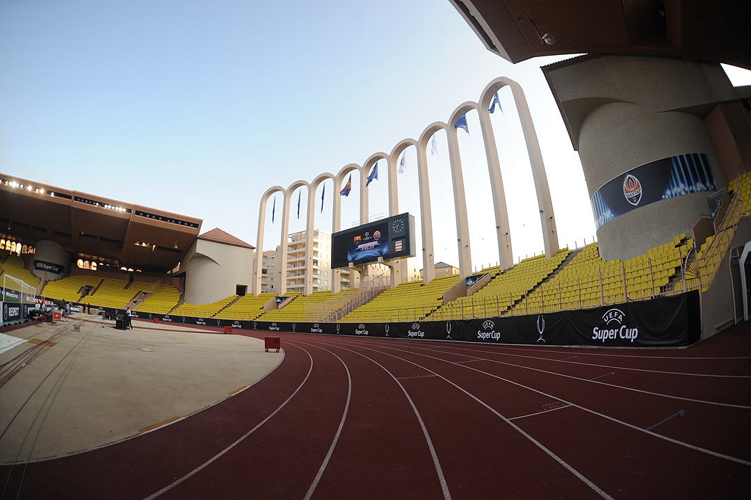 Stade Louis II 2009